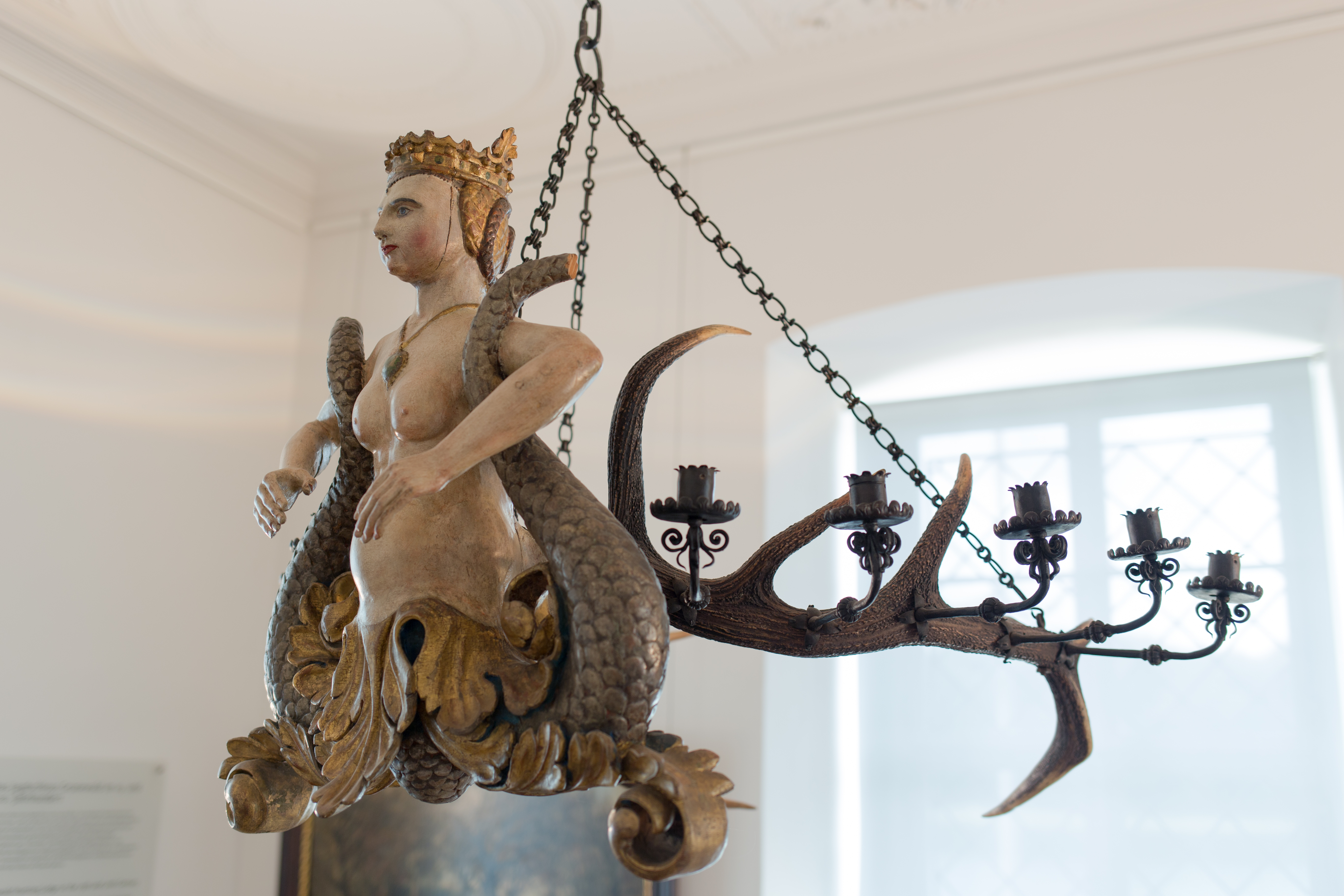 Leuchterweibchen. Ende 17. Jahrhundert (?) Auch Beleuchtungskörper wurden aus Geweihen hergestellt. Eine Kombination aus geschnitten figürlichen Elementen und Geweihstangen stellen die Leuchterweibchen und Leuchtermänner dar. In der Renaissance entwarfen berühmte Künstler wie Albrecht Dürer diese fantasievollen Leuchter.